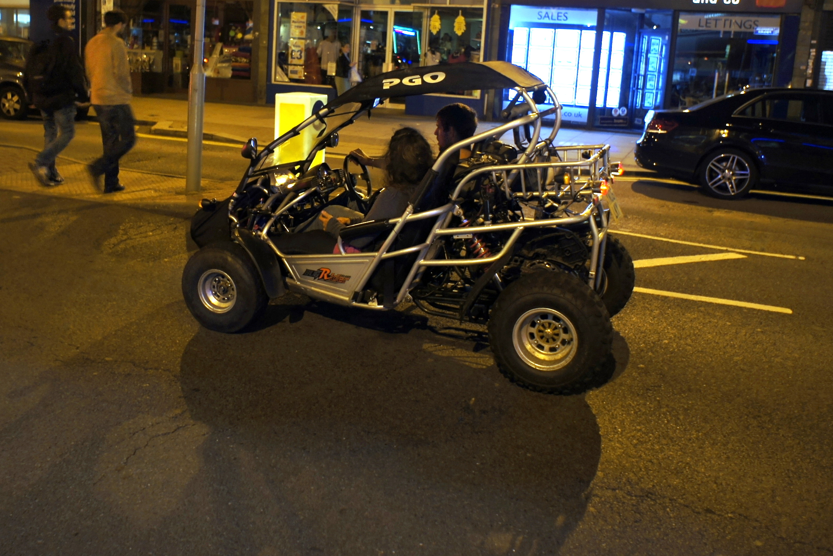 Buggy wykorzystywany w jeździe miejskiej ( model PGO Bug Rider na ulicy w Londynie )